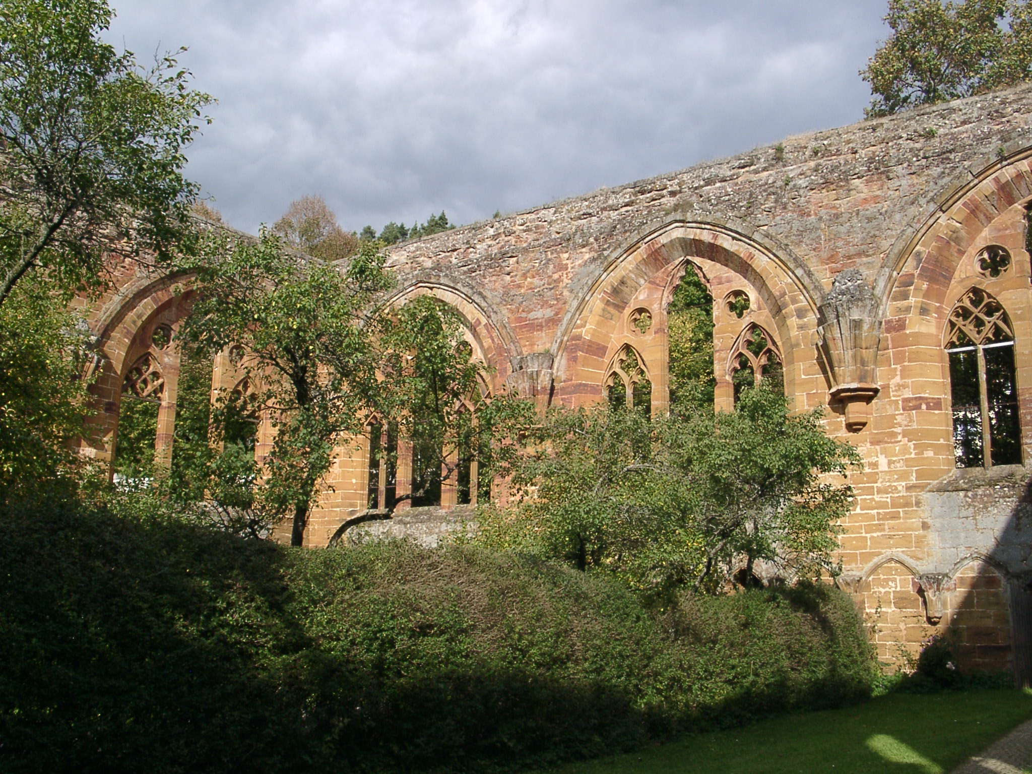 Kloster Gnadenberg